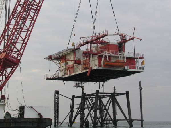 REM-eiland voor de kust van Noordwijk. Door de Zeilvereniging Noordwijk bij langeafstandswedstrijden als keerpunt gebruikt (en bij de afbraak waren ze ook aanwezig).